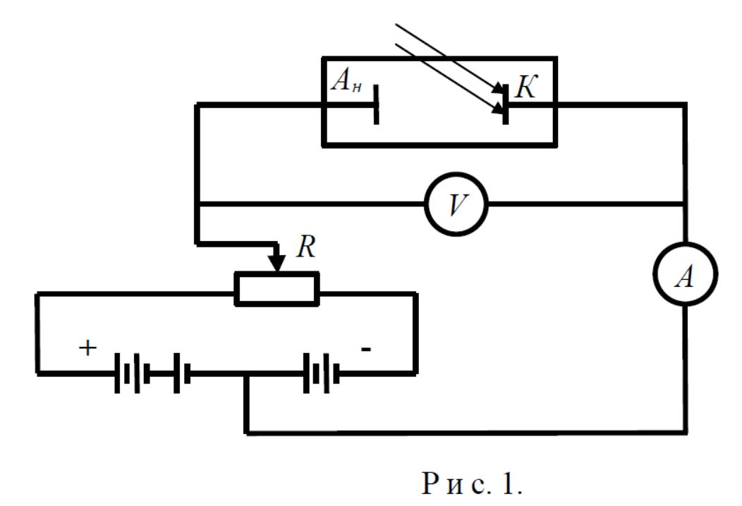 Установка для изучения внешнего фотоэфекта